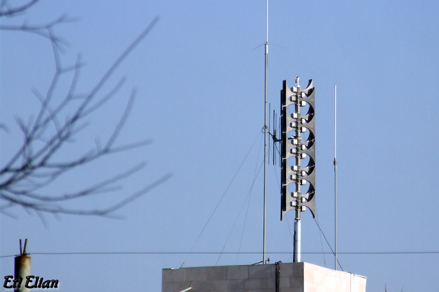 מערכת צופרים של "צבע אדום" על גג מועצה אזורית באר טוביה